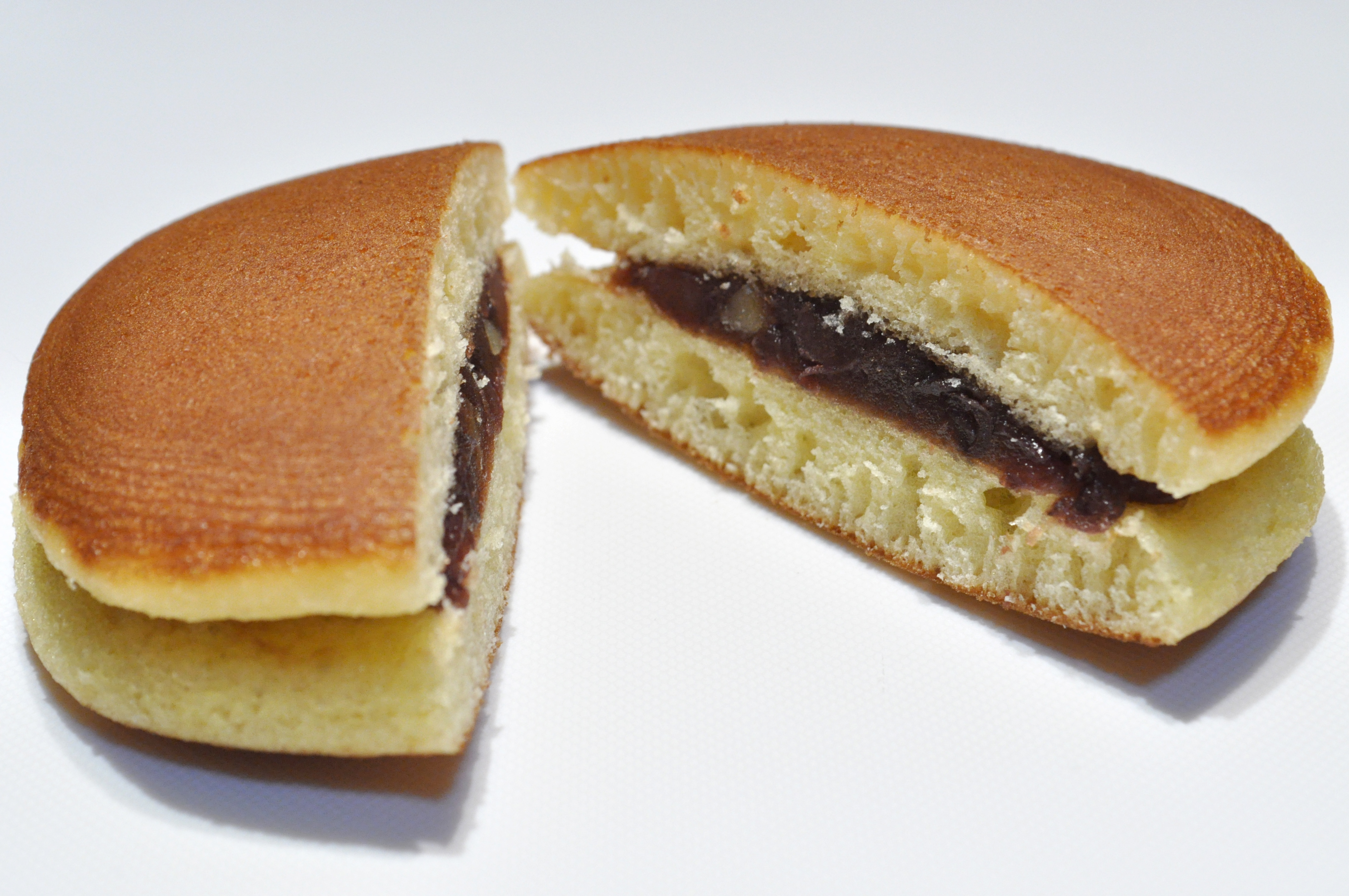 一般的などら焼きを切り開いたもの。このどら焼きの場合はあんこに栗が混ぜられている。